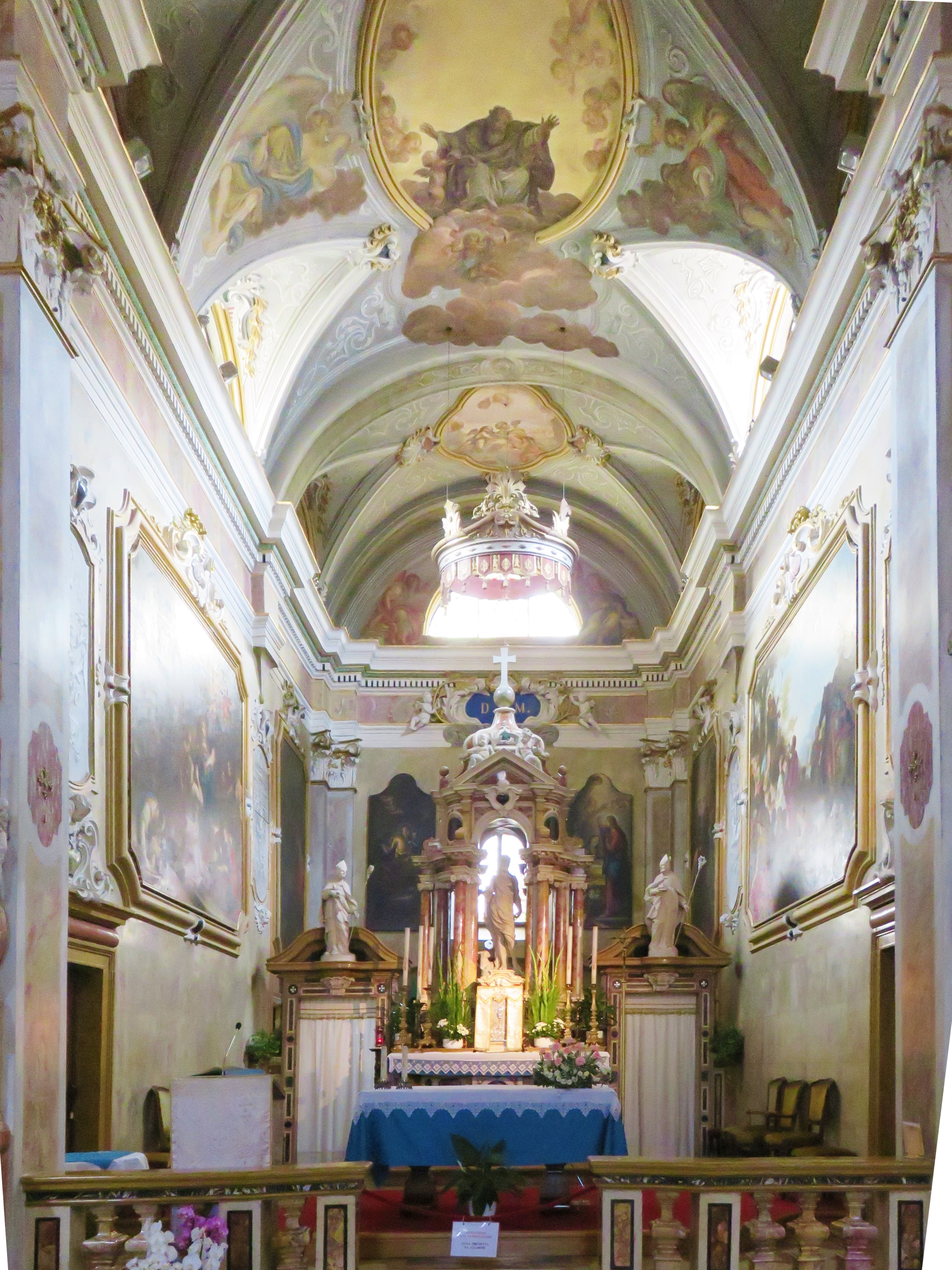 Chiesa di San Giovanni Battista - Interno